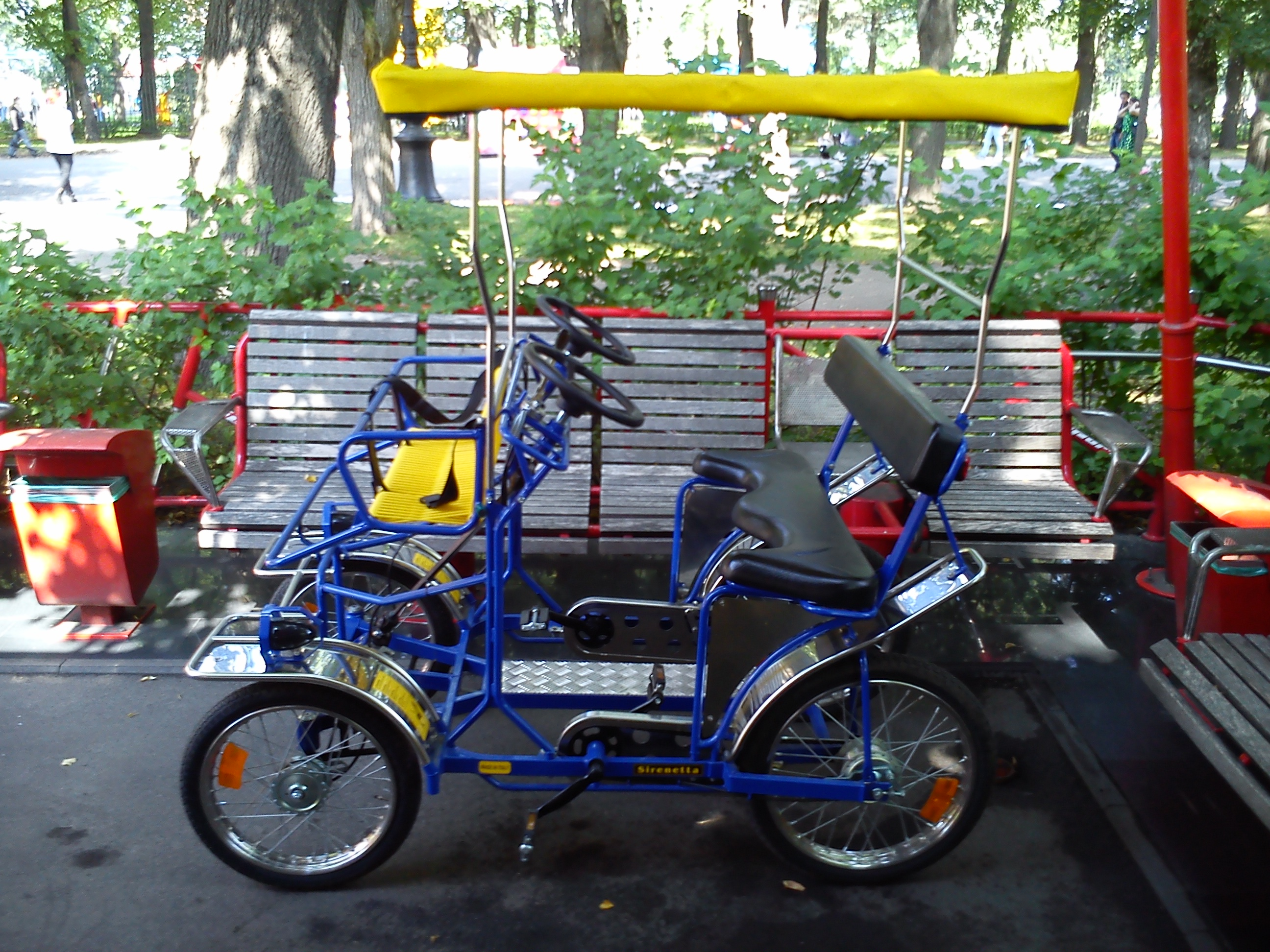 Двухъместный веломобиль